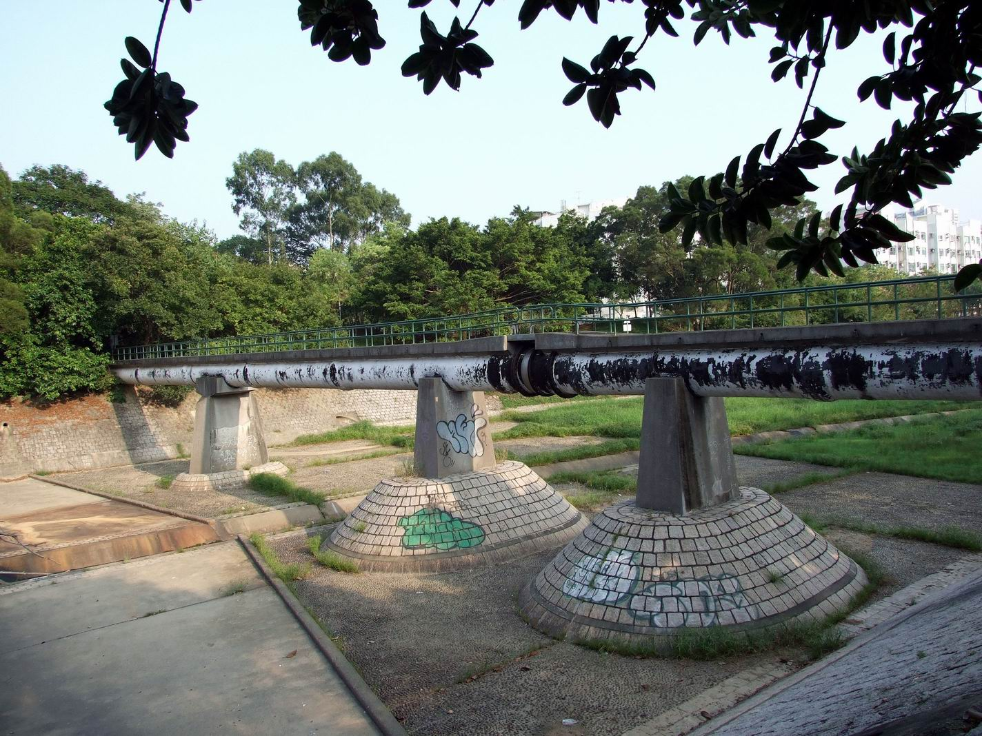 橫越林村河的小橋